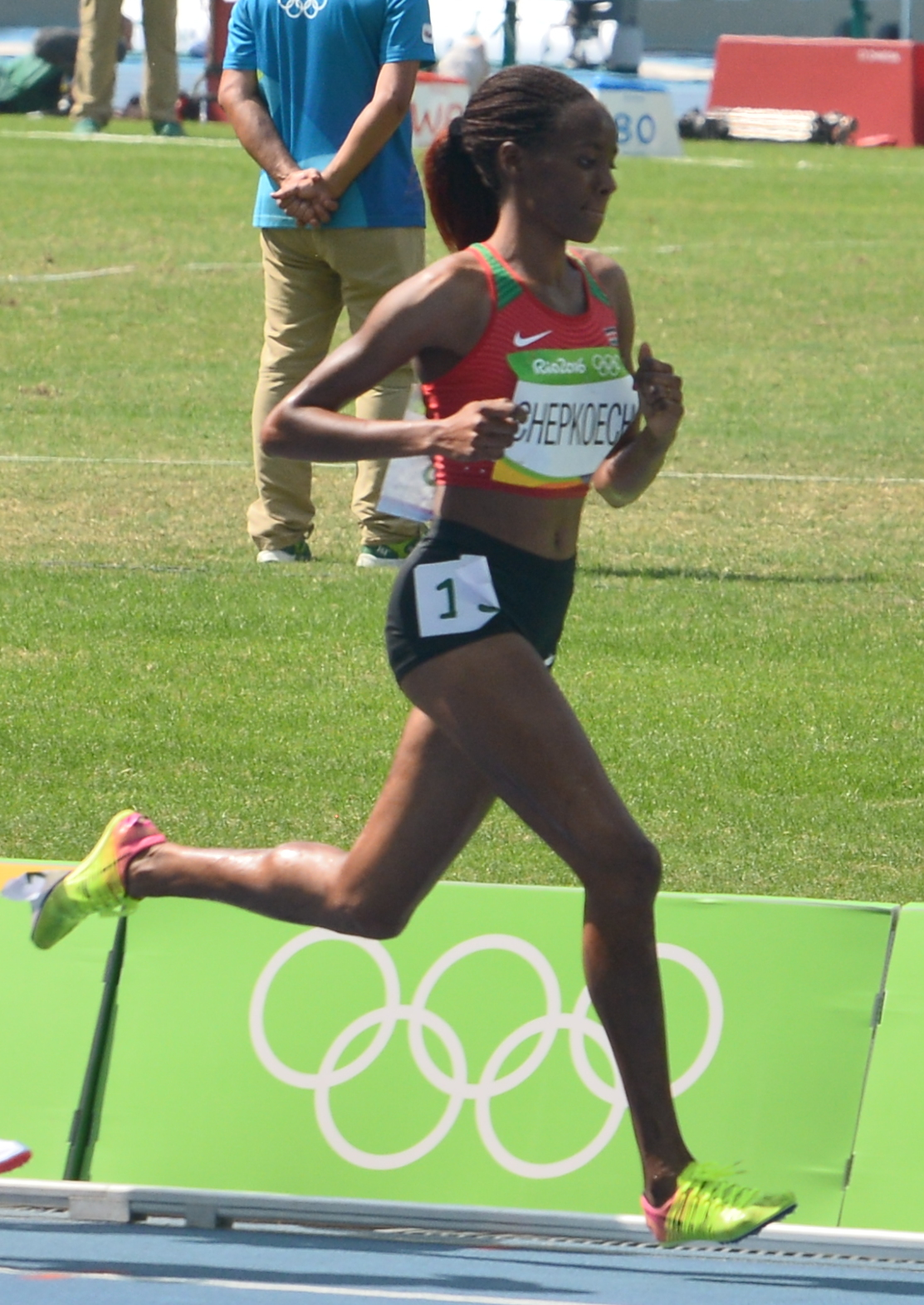 Finale du 3000m steeple des jo de Rio 2016: Beatrice Chepkoech